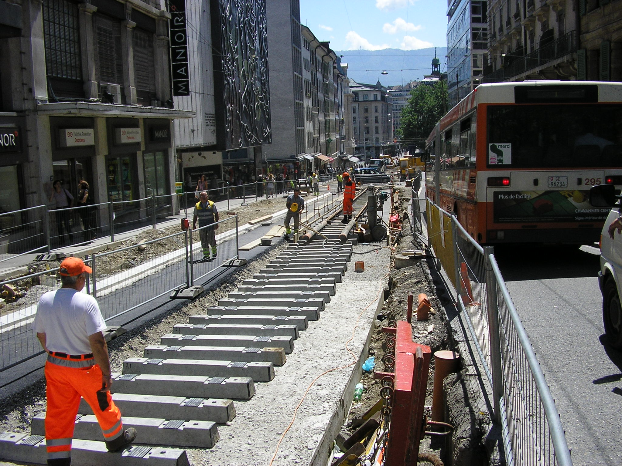 Chantier de la future ligne de tram TCOB Cornavin-Onex-Bernex au centre ville, rue de Coutance, à Genève.